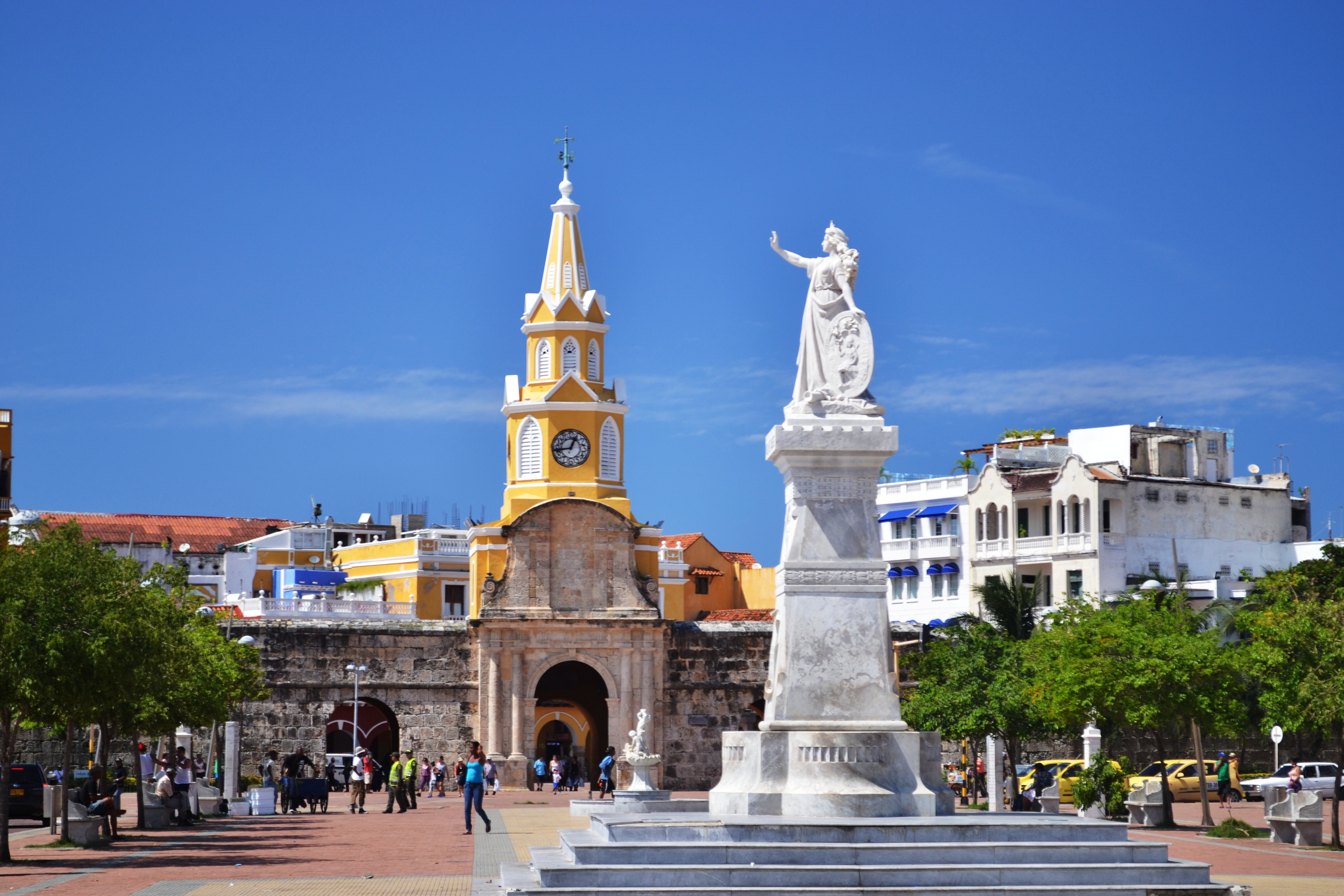 Puerta Principal. Hoy del Reloj